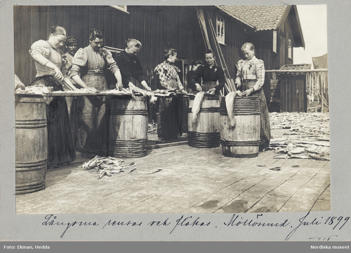 "Långorna rensas och fläkas. Mollösund. Juli 1899". En grupp kvinnor står och rensar fisk med tunnor som bord.